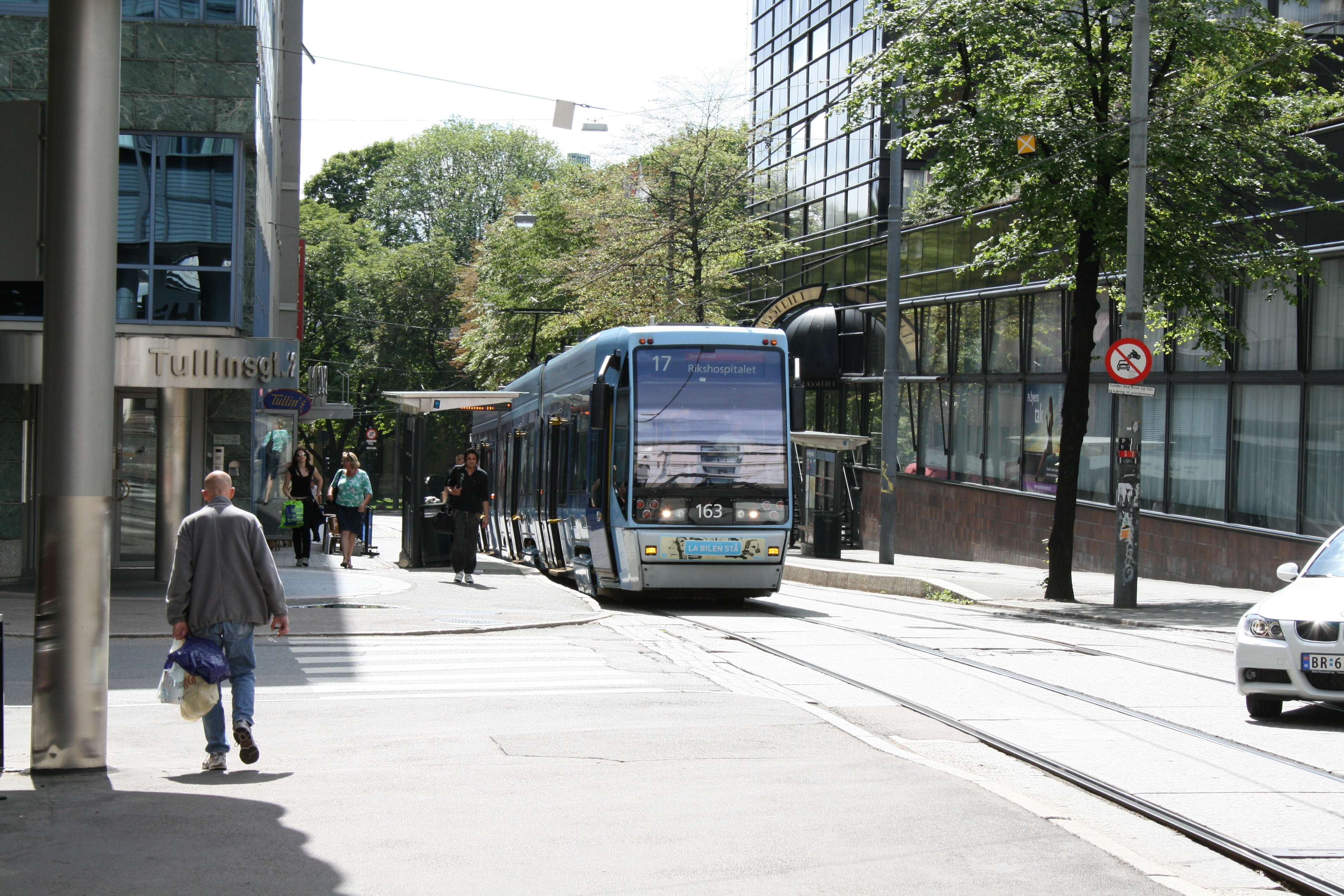 Tullins gate i Oslo. Tullins gate 2 til venstre, SAS-hotellet til høyre.